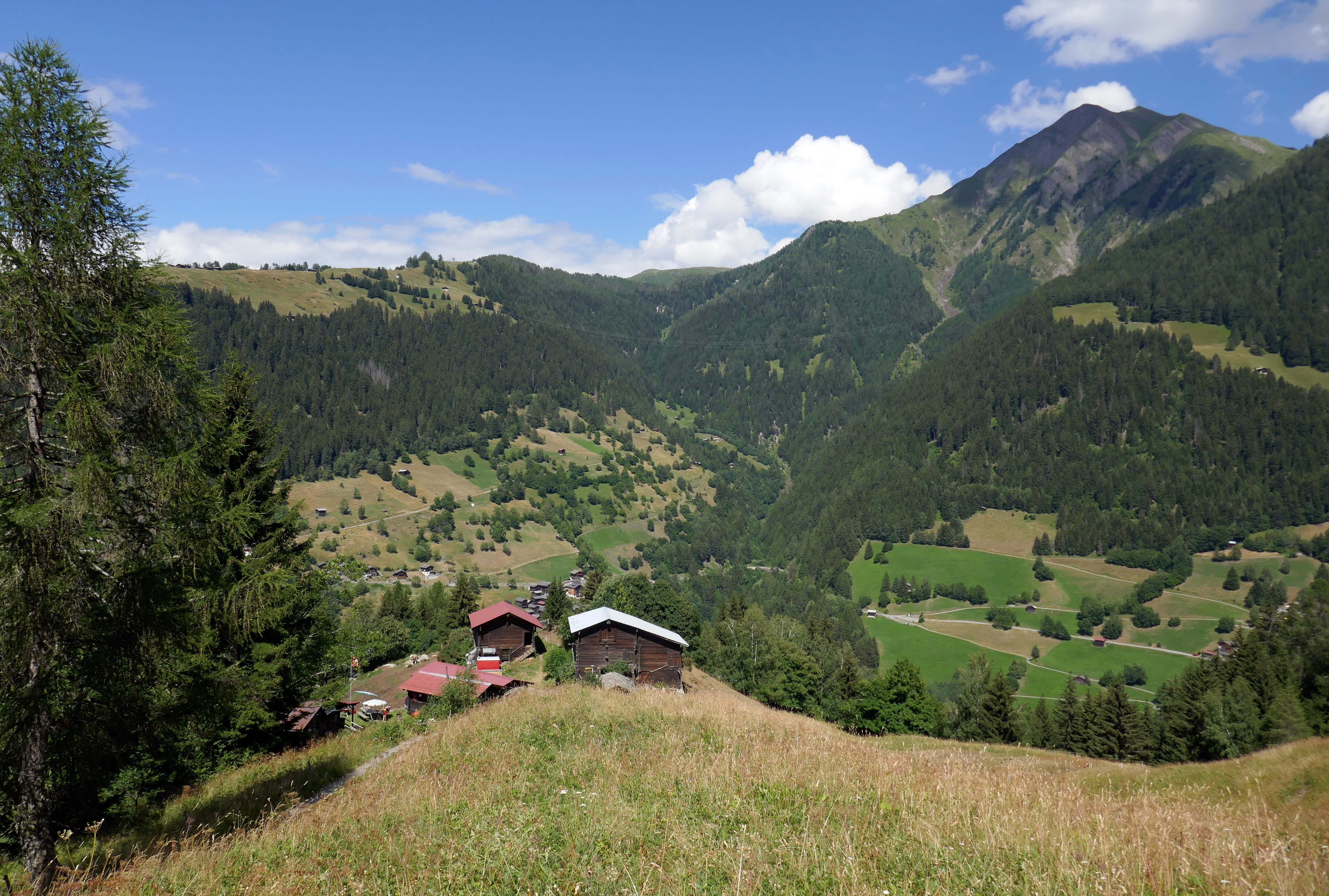 Ort: Schaertegga